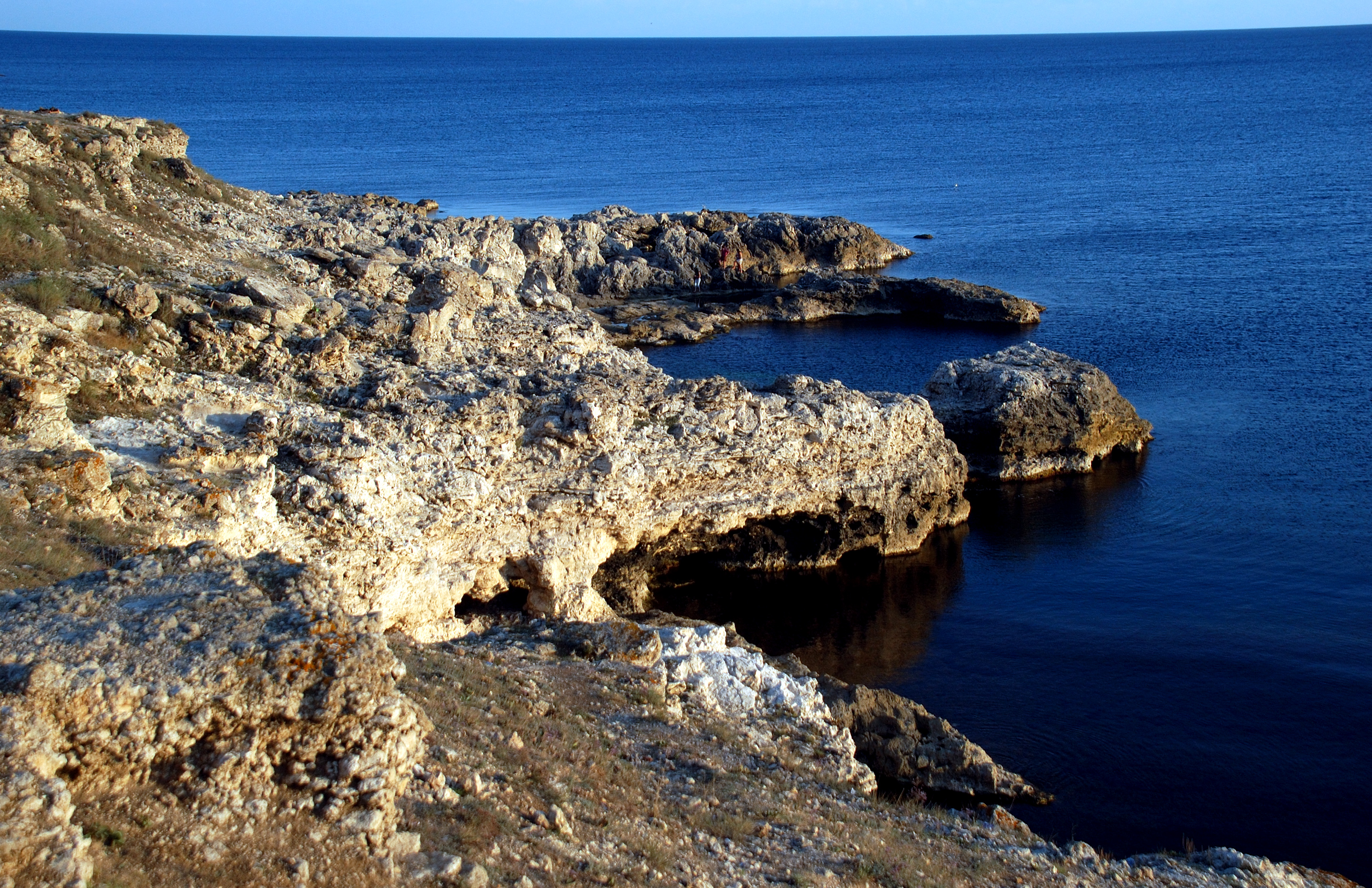 Атлеш